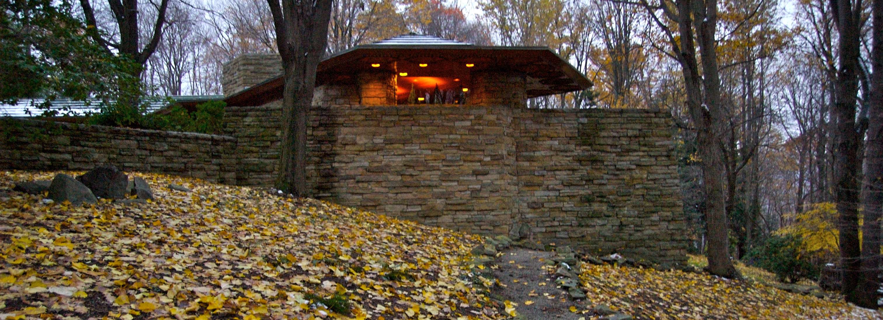 Kentuck Knob in Pennsylvania.